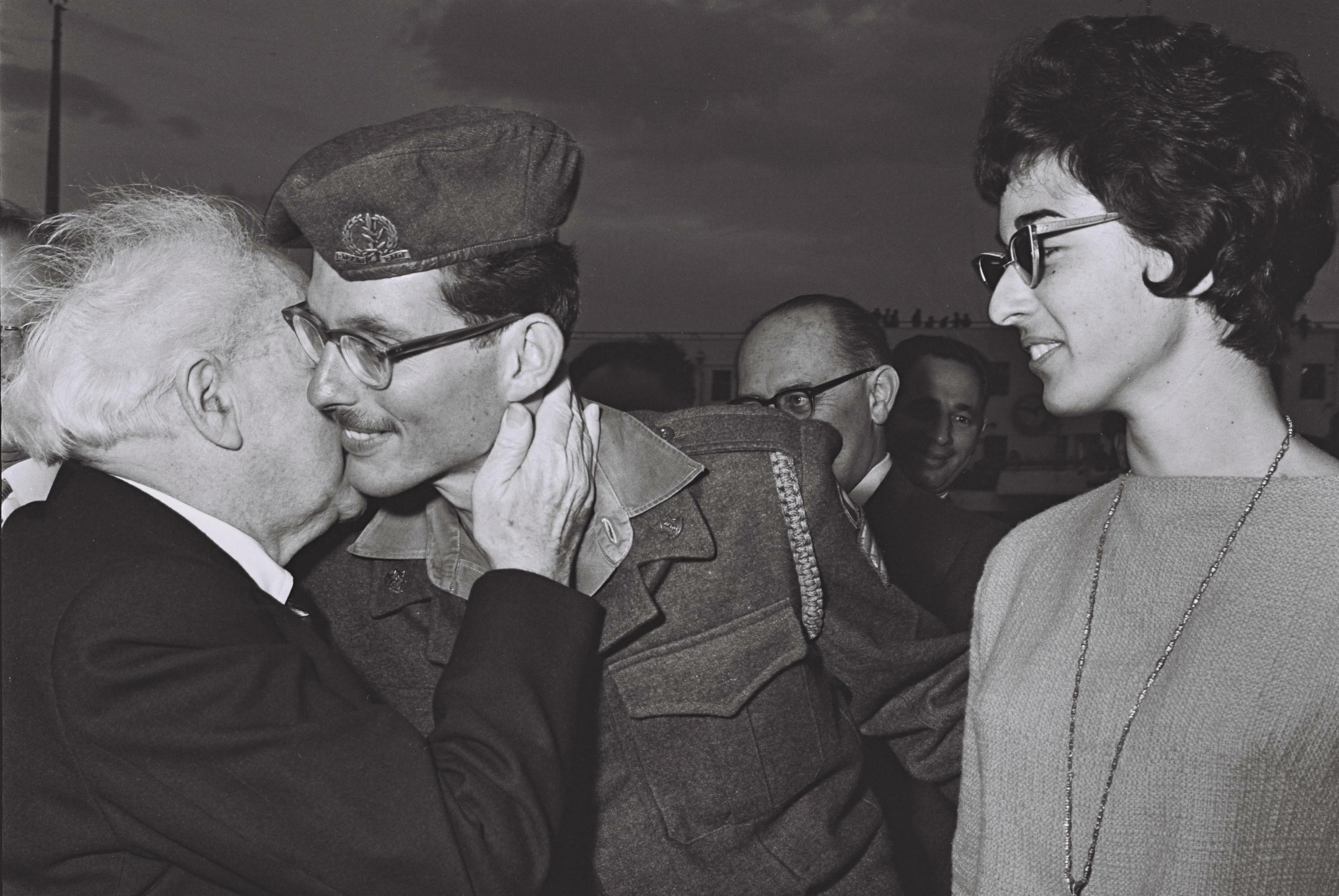 ראש הממשלה דוד בן גוריון נפרד מנכדו יריב בן אליעזר ואשתו דליה בשדה התעופה לוד בטרם יצא לביקור בבורמה